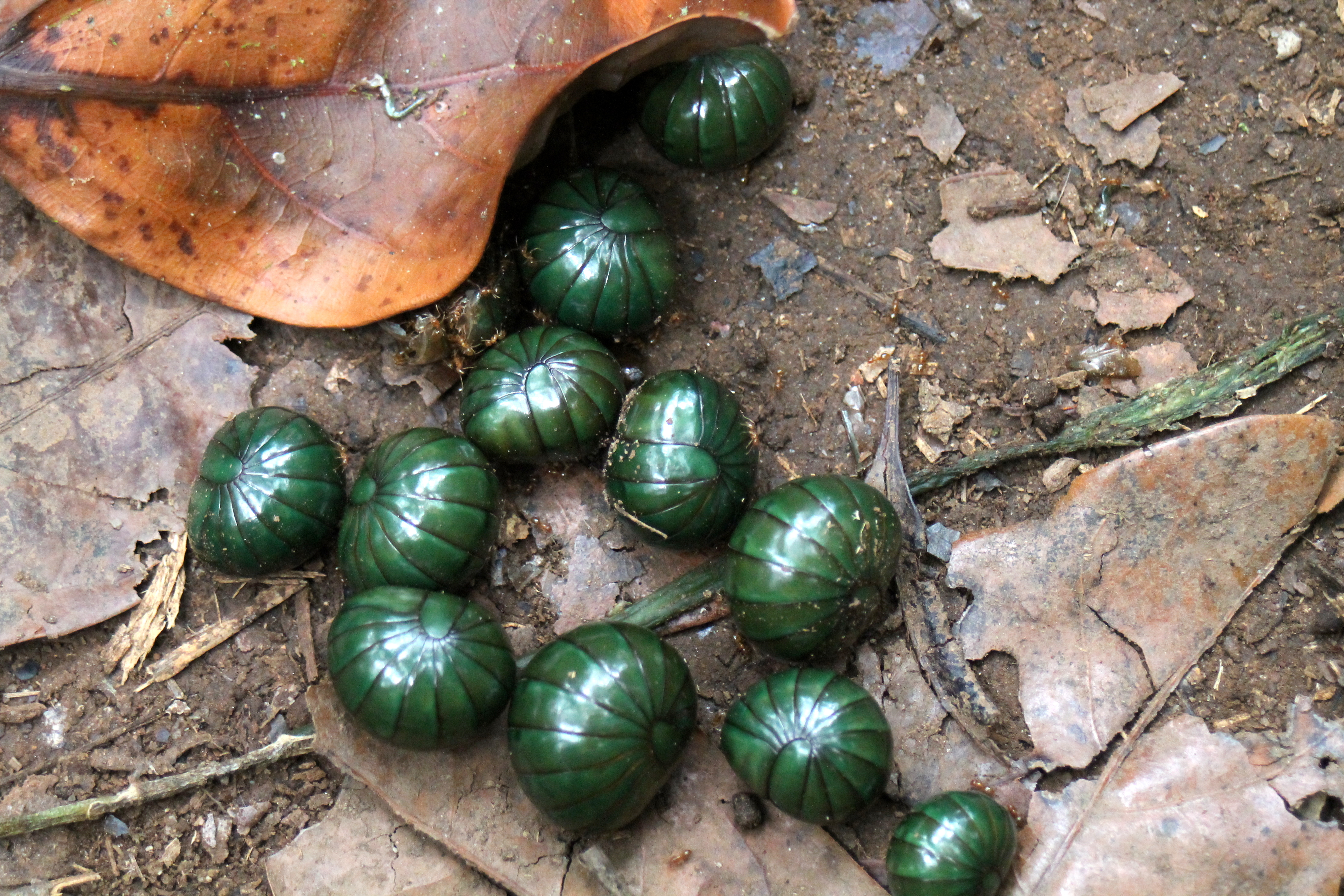 Oproller in Mantadia